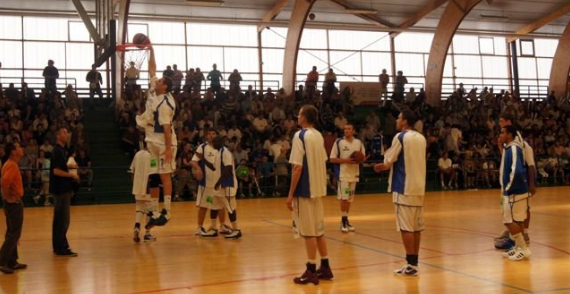 chartres